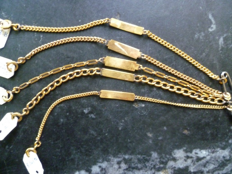 Anciennes gourmettes Murat en plaqué or des années 1960-1970